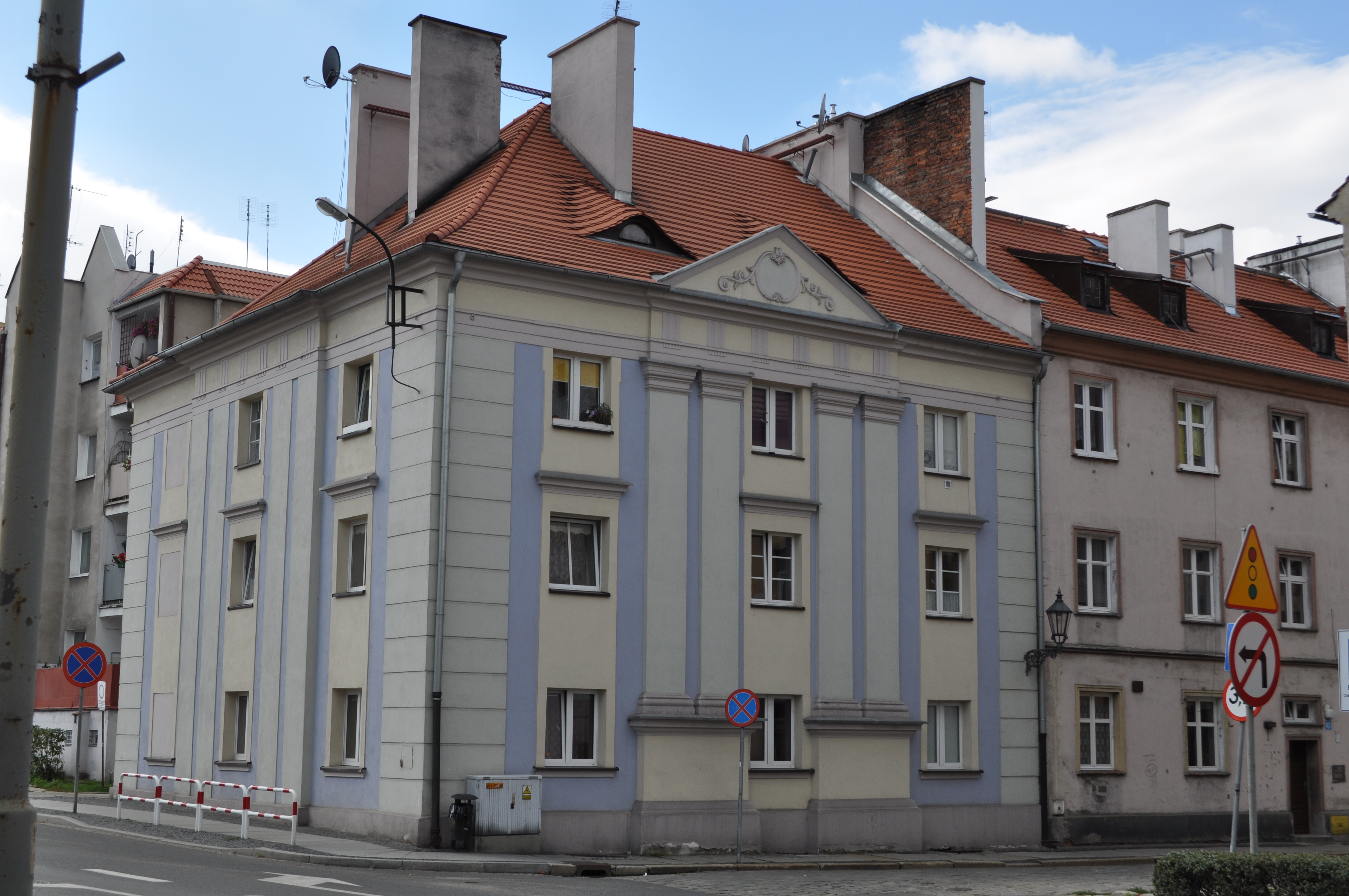 bożnica, ob. dom mieszkalny Brzeg, ul. Długa 61, Brzeg 01.1958.